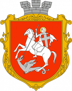 Герб міста Володимир-Волинський